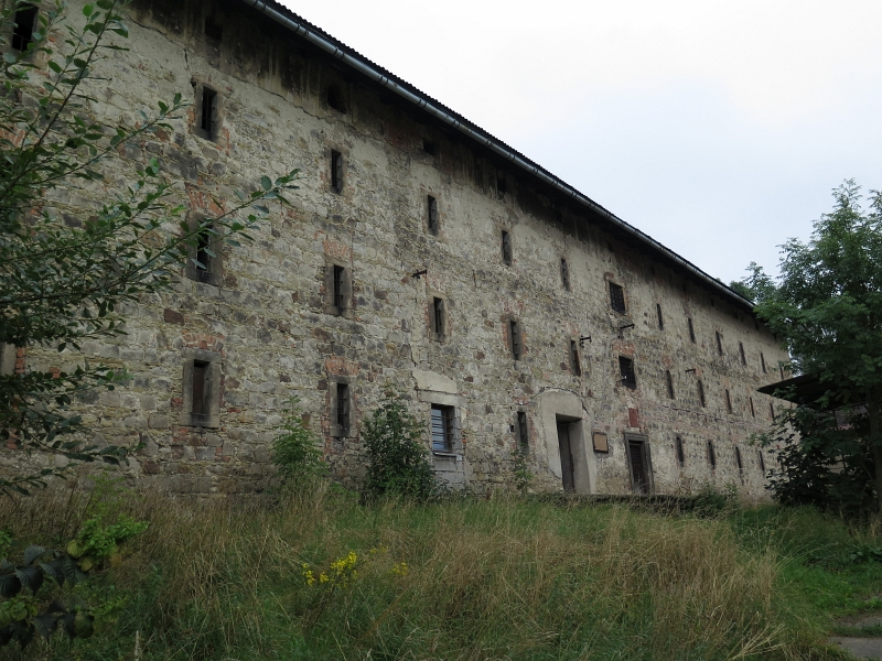 Sýpka, Radimovská, Velká Ledhuje.